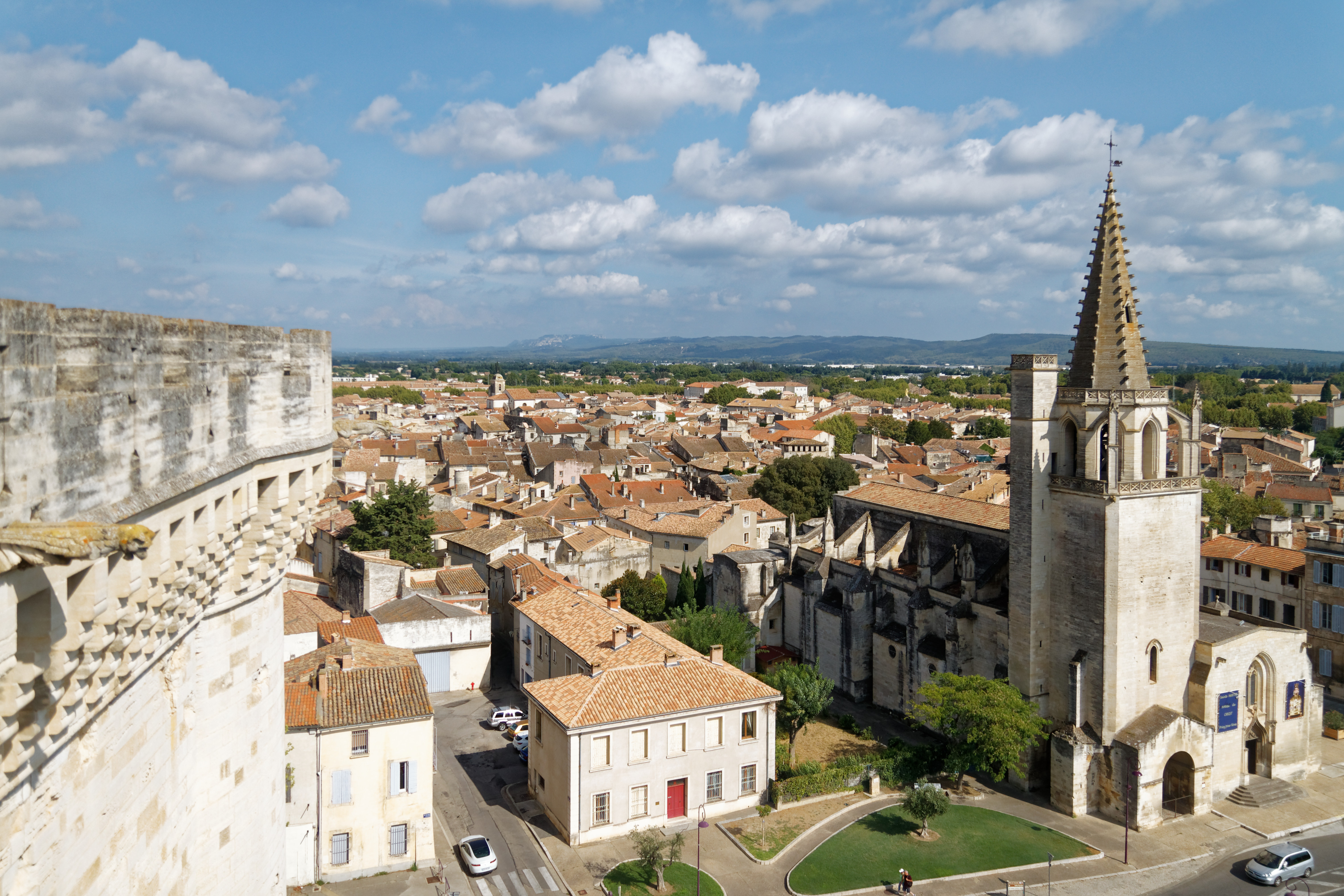 Église Sainte-Marthe in Tarascon, vom Dach des Schlosses aus gesehen